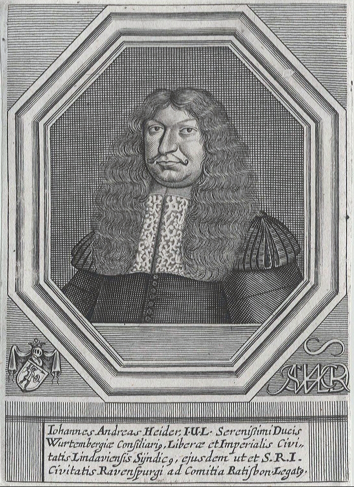 Johann Andreas Heider von und zu Gitzenweiler (1639–1719), ältester Sohn des Lindauer Patriziers und Gesandten zum Westfälischen Frieden Valentin Heider und seiner ersten Gattin, der Margarethe Pfister gen. Kreidenmann; Jurist, herzoglich württembergischer Geheimer Rat und Syndikus der Freien und Reichsstadt Lindau, ebenso der Reichsstadt Ravensburg Gesandter zum Reichstag zu Regensburg, Gatte der Patriziertochter Anna Regina von Ebertz aus der Reichsstadt Isny.